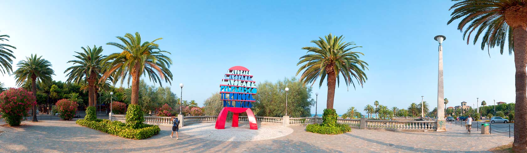 Lavorare, lavorare, lavorare, preferisco il rumore del mare: questo il motto del “monumento di parole” di Ugo Nespolo che dal 1998 è meta obbligata per chi fa tappa a San Benedetto del Tronto.